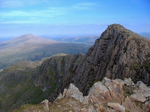 Y Lliwedd East Peak from Y Lliwedd